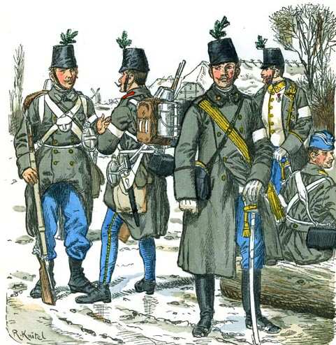 k.k. Infanterie im Feldzug gegen Dänemark 1864